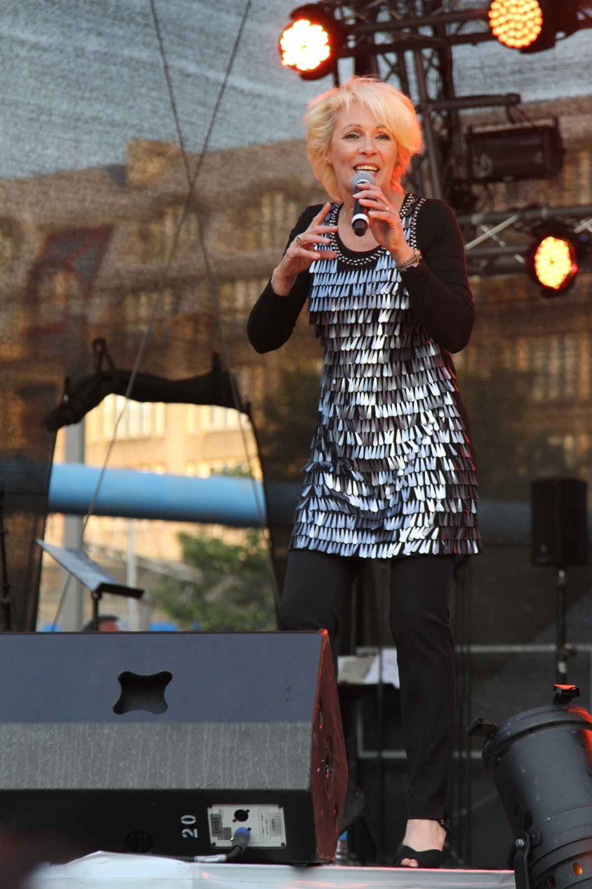 Ingrid Peters im Juli 2011